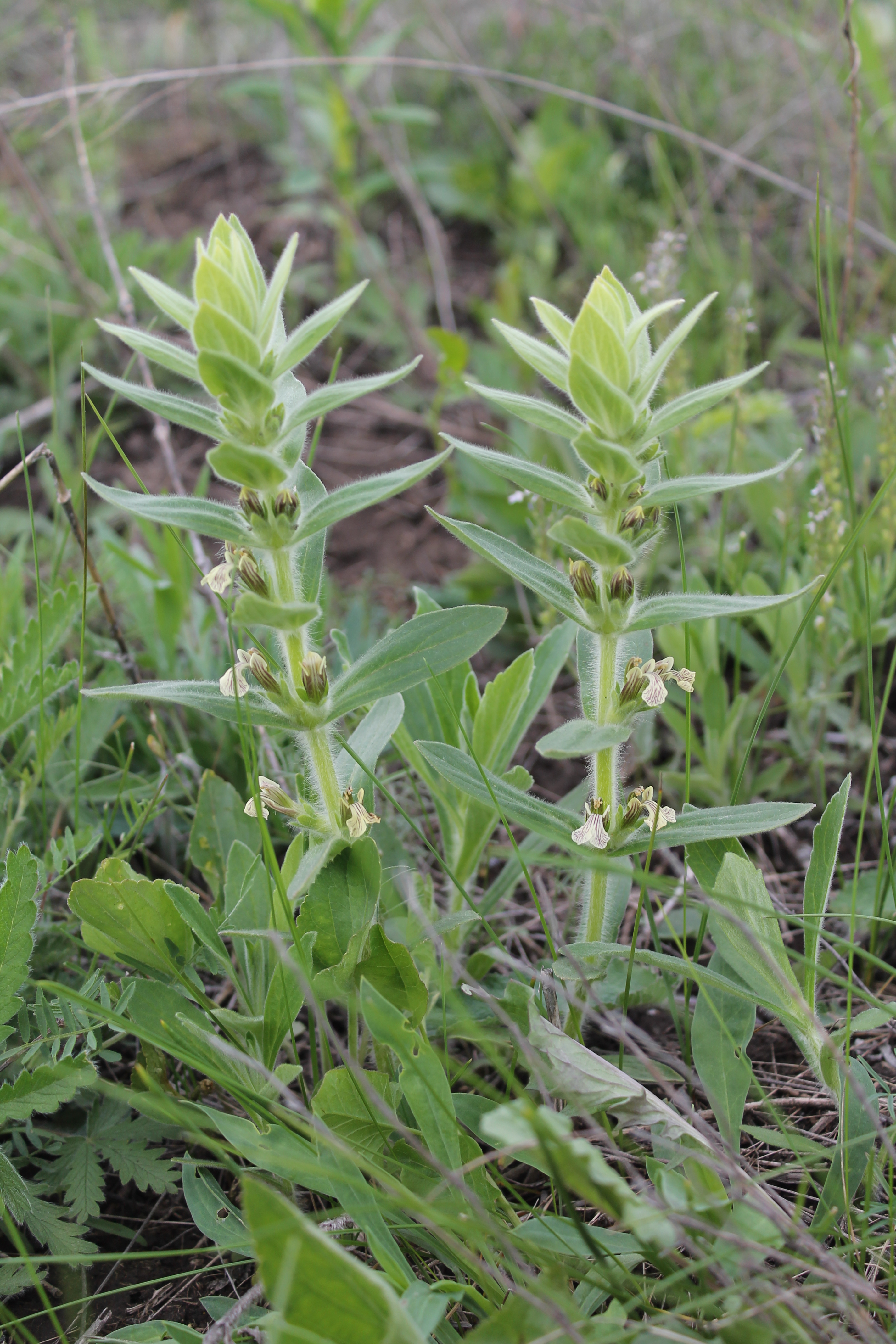 Розквітаюча рослина. Україна, Дніпропетровська область, Криворізький район